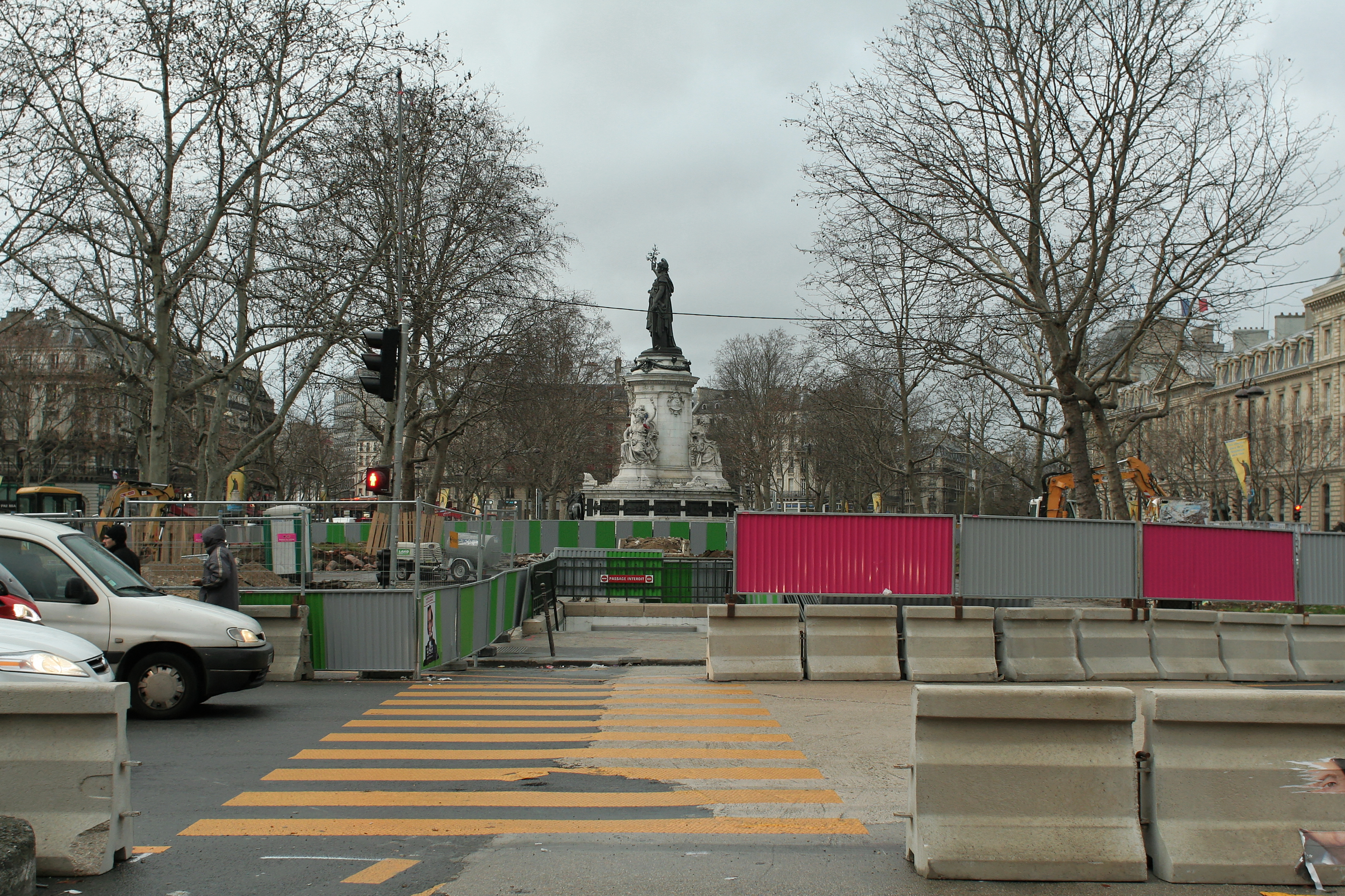 Travaux de réaménagement de la place de la République (Paris). Sortie du métro, face au bld Voltaire.